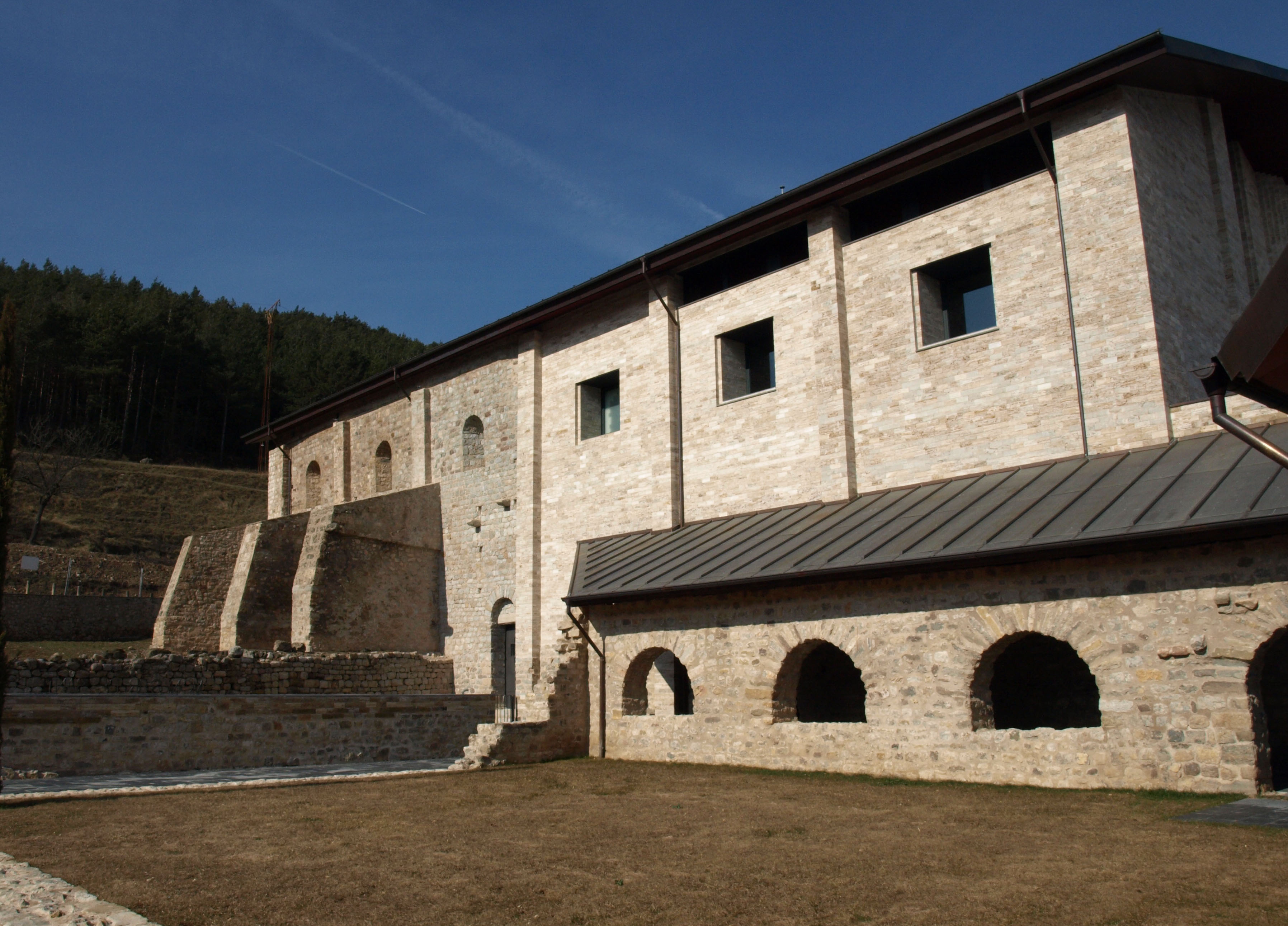 Església de Sant Llorenç prop Bagà (Guardiola de Berguedà)